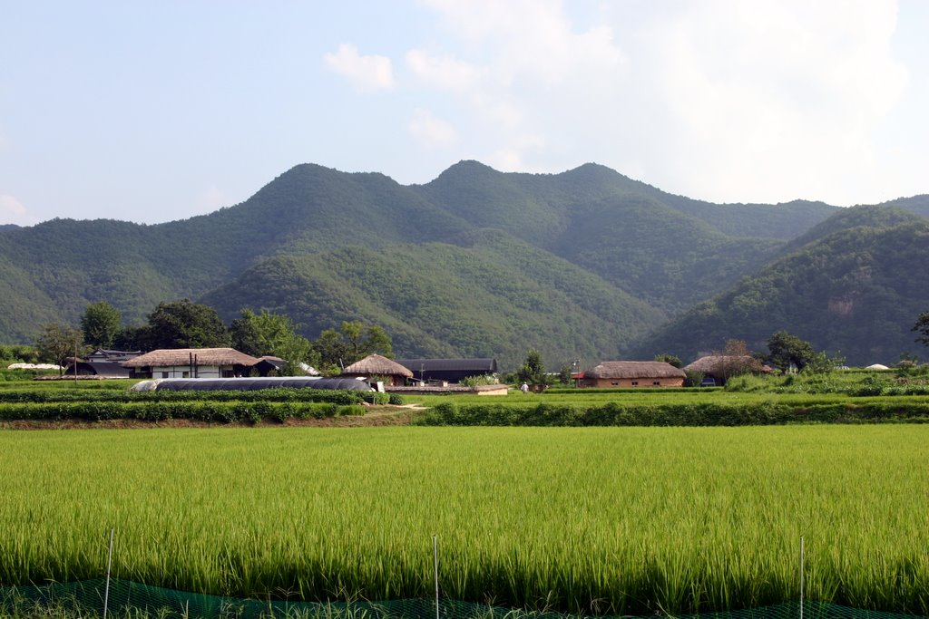 Hahoe Folk Village in Andong, Gyeongsangbuk-do, South Korea.